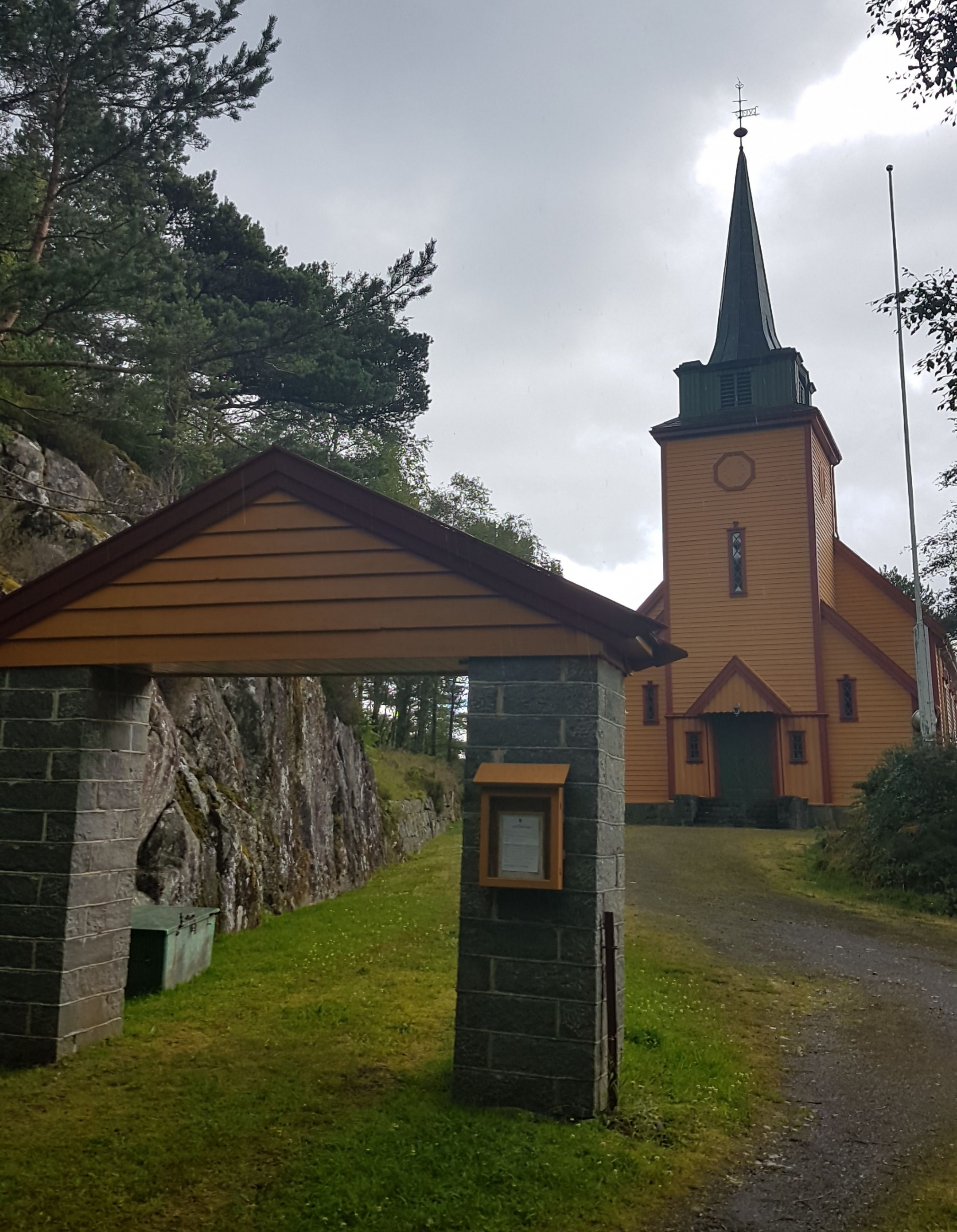 Reksteren kirke. Foto: Roger Grimelid. Fra Riksantikvarens Kulturminnesøk.